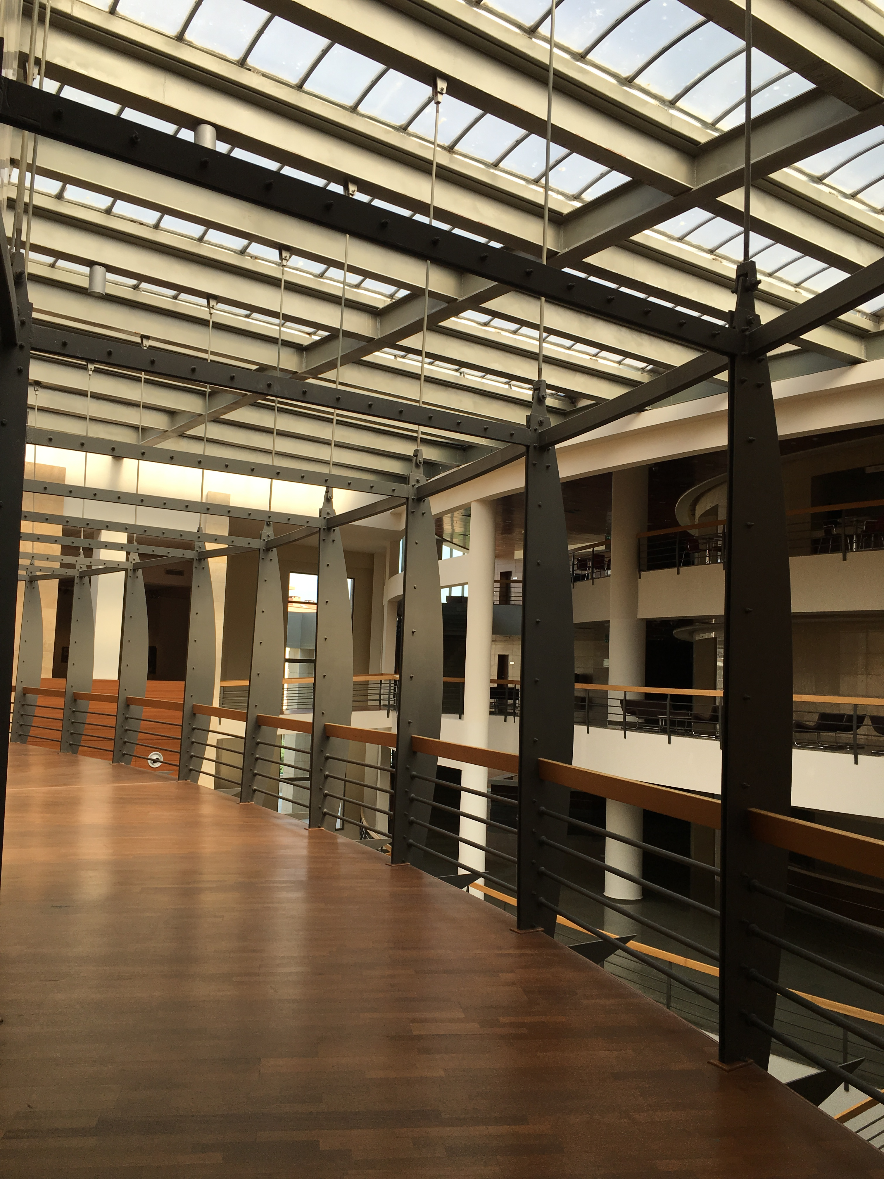 Details of the suspended bridge and balconies can be seen.